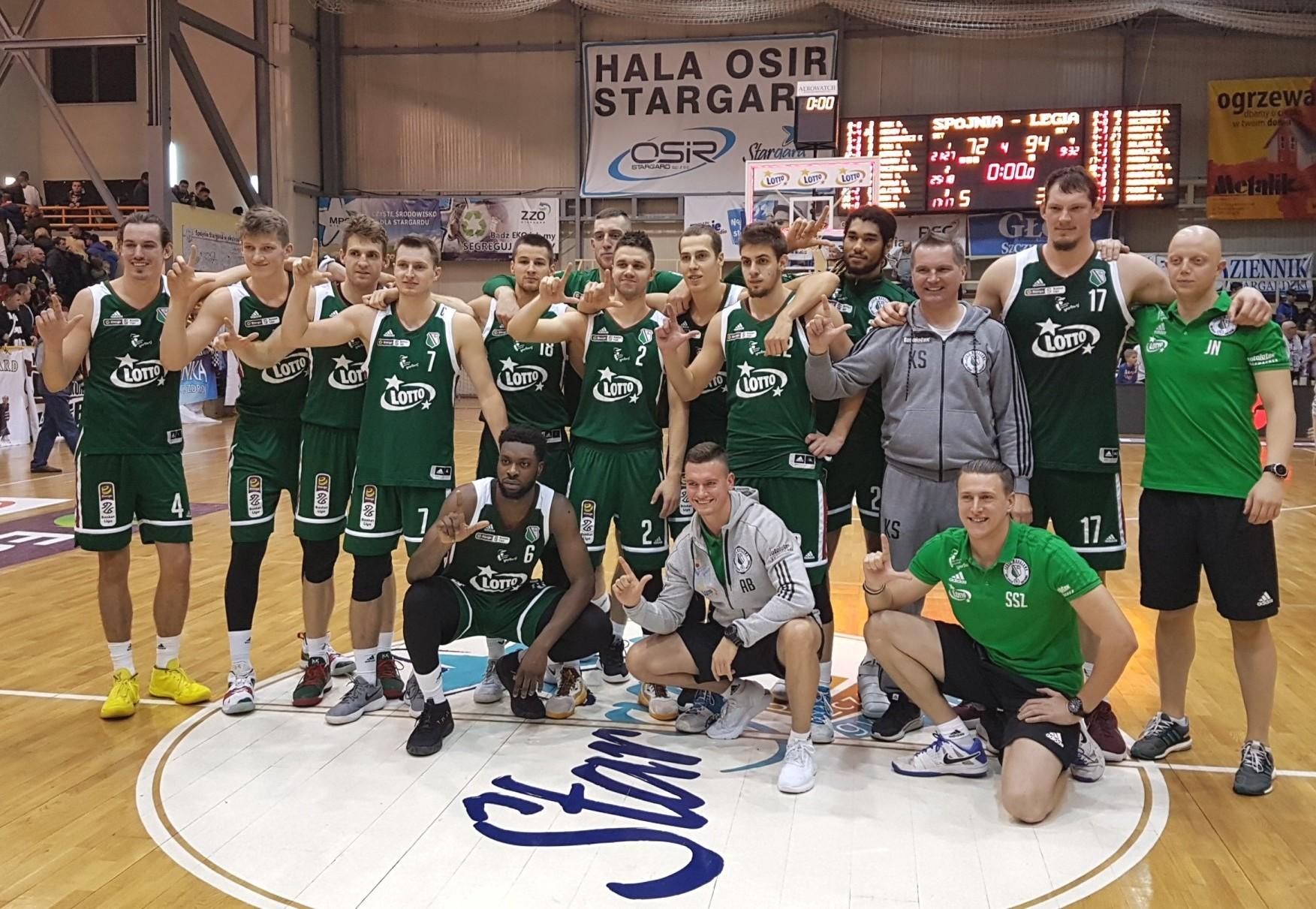 Legia Warszawa (17.11.2018)